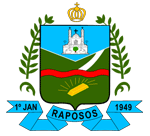 Brasão de armas do município de Raposos, Minas Gerais, Brasil.